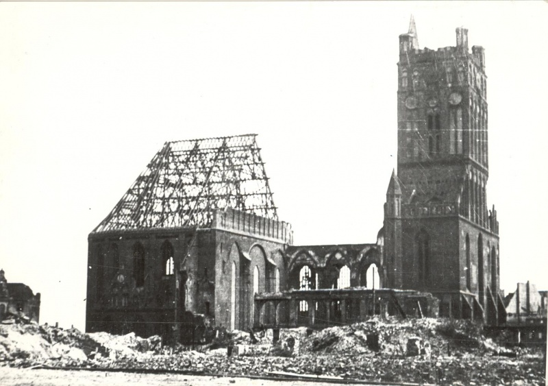 Ruiny kościola sw. Jakuba